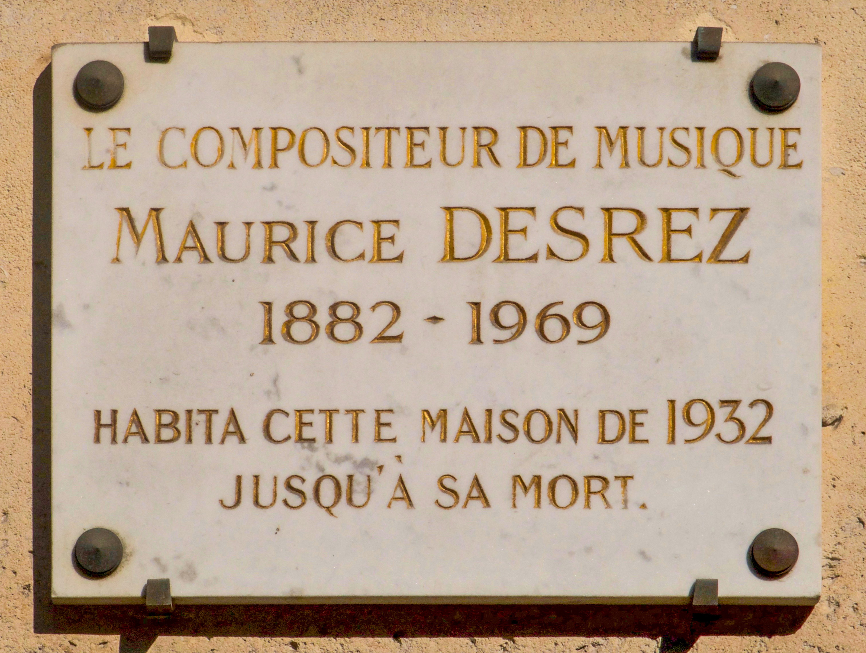 Plaque en hommage à Maurice Desrez, 39 boulevard Raspail (Paris, 7e).